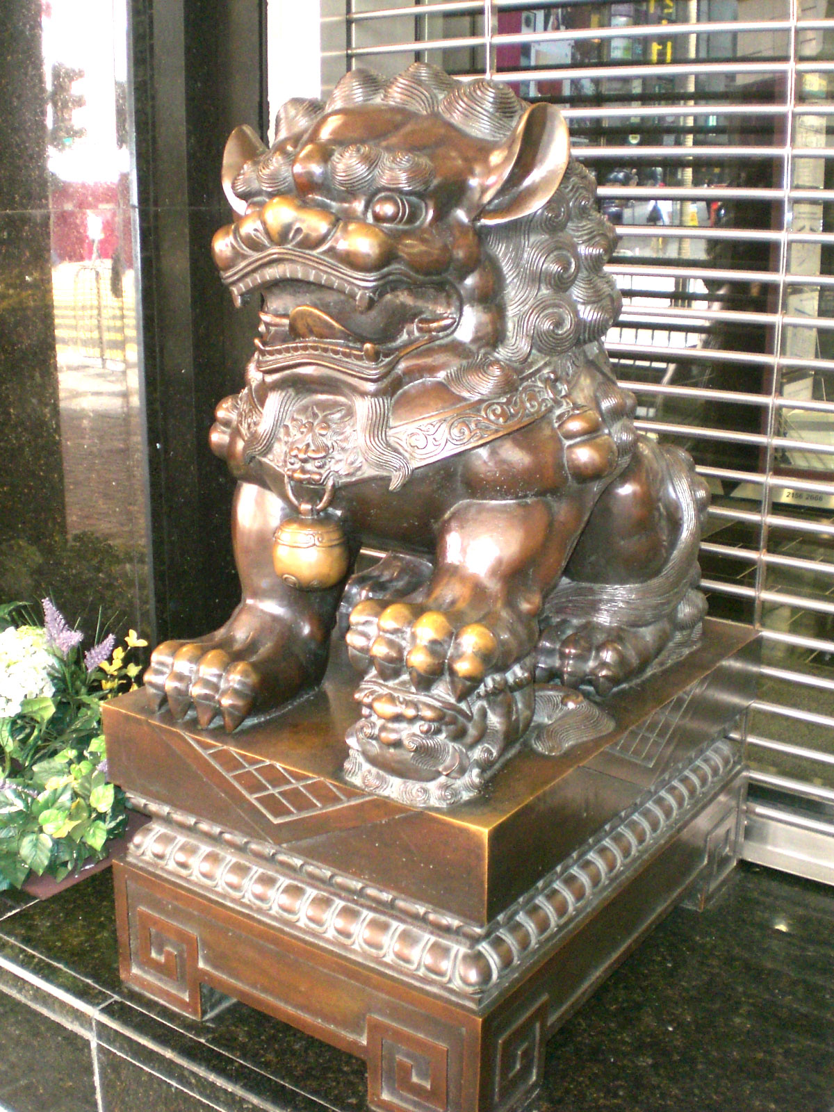 青銅吉祥物在怡安華人行門前, Central, Hong Kong